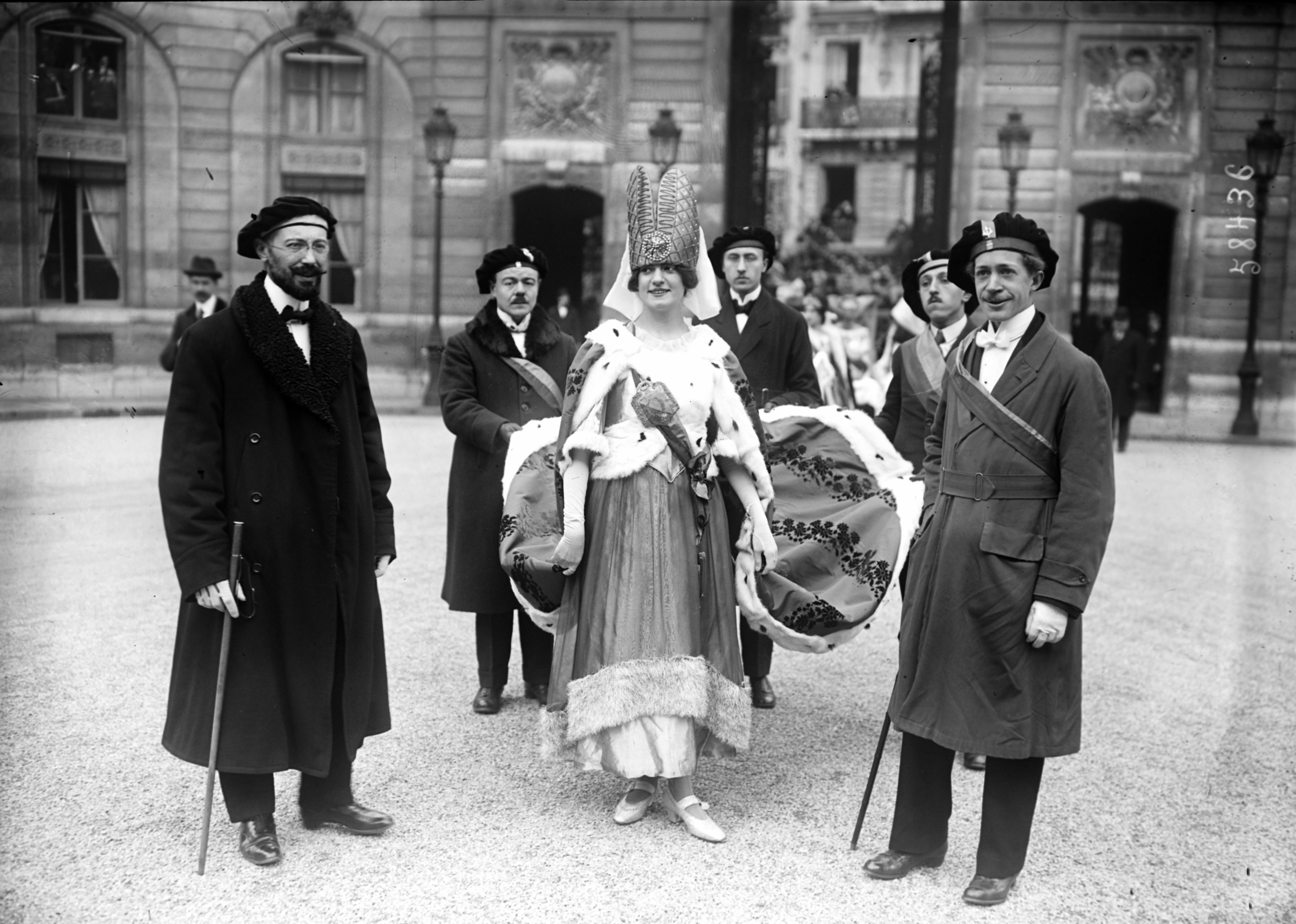 La Reine des étudiants de Paris reçue à l’Élysée accompagnée d'étudiants portant la faluche.